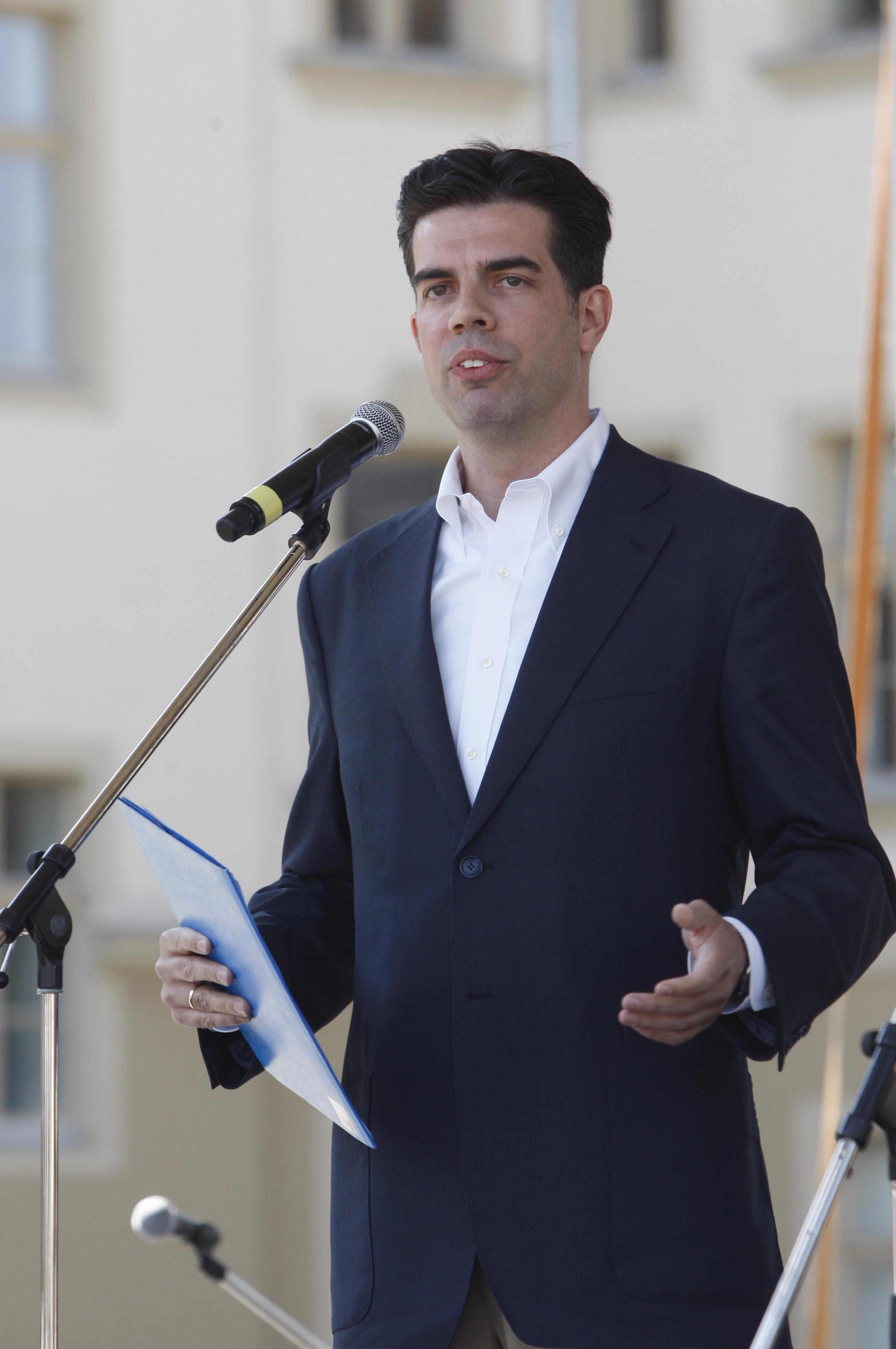 A magyarországi EU-intézmények az Európa-nap alkalmából az idén kétnapos fesztivállal várják a családokat a május 7-8-i hétvégén a Millenárison. Az egész napos gyermek- és családi programok, színielőadások és koncertek - például a Budapest Bár produkciója - mellett a fesztiválon bemutatkoznak az európai tájékoztató szolgálatok, és különleges hangsúlyt kapnak az olyan témák mint az önkéntesség, a fiatalok mobilitása, a soknyelvűség, a klímaváltozás és a diszkrimináció elleni küzdelem. Gyürk András EP.képviselő.